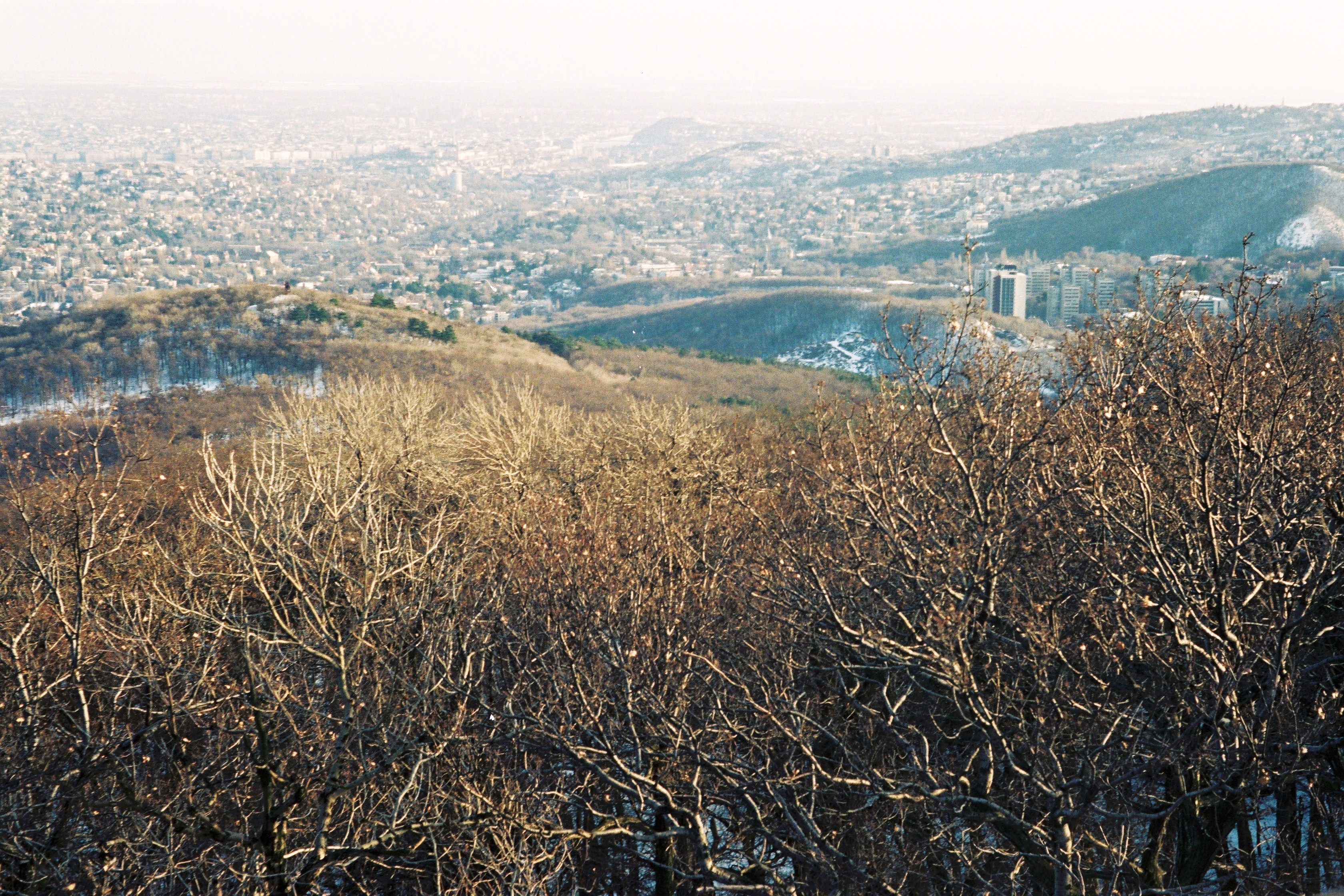 Nagy-hárs-hegy, látkép a Kaán Károly-kilátóból. Location: Hungary, Budapest II. Tags: picture, Budapest Title: Nagy-hárs-hegy, látkép a Kaán Károly-kilátóból.